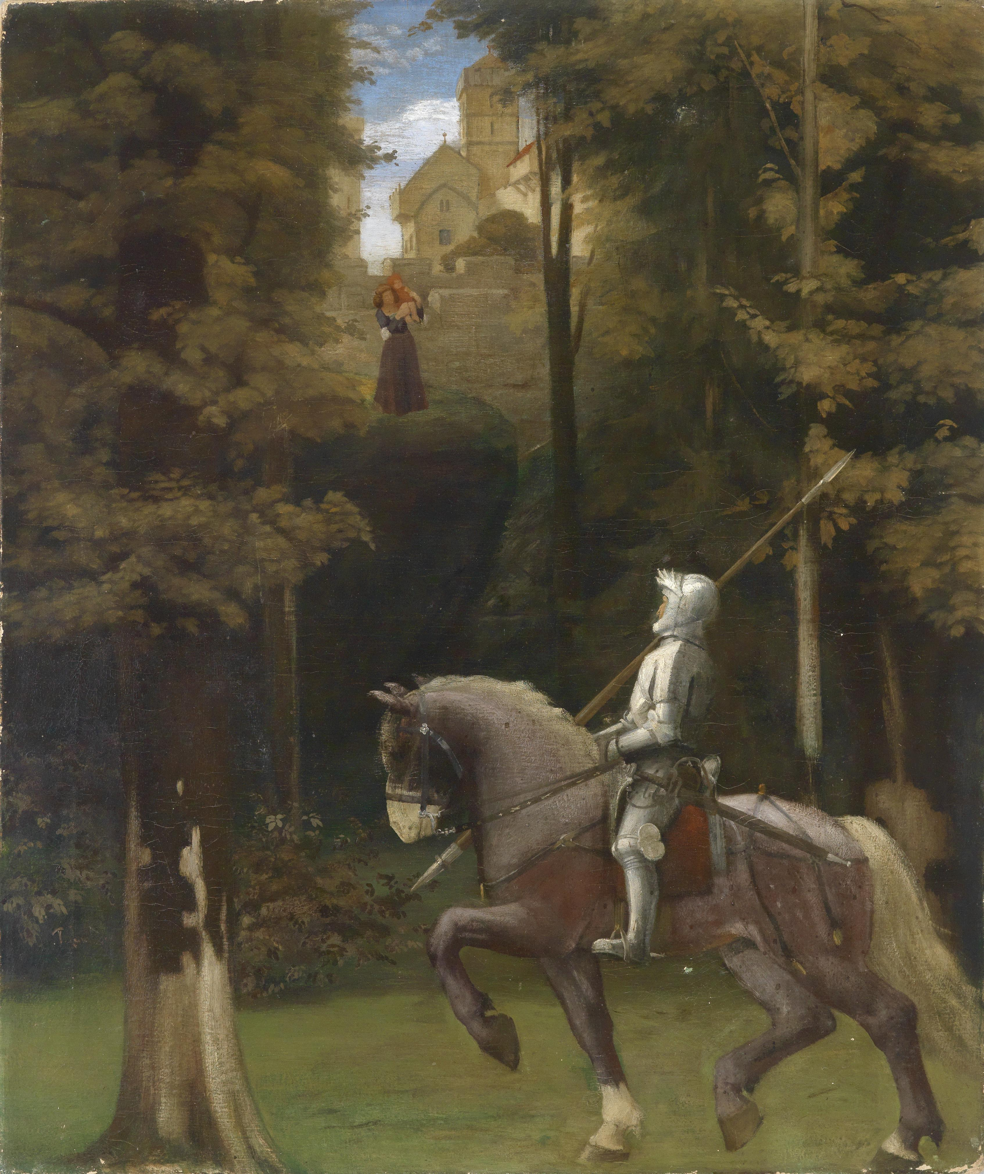 Der Ritter, Signaturreste P. Lau... nn, Öl auf Leinwand, 96 x 80 cm